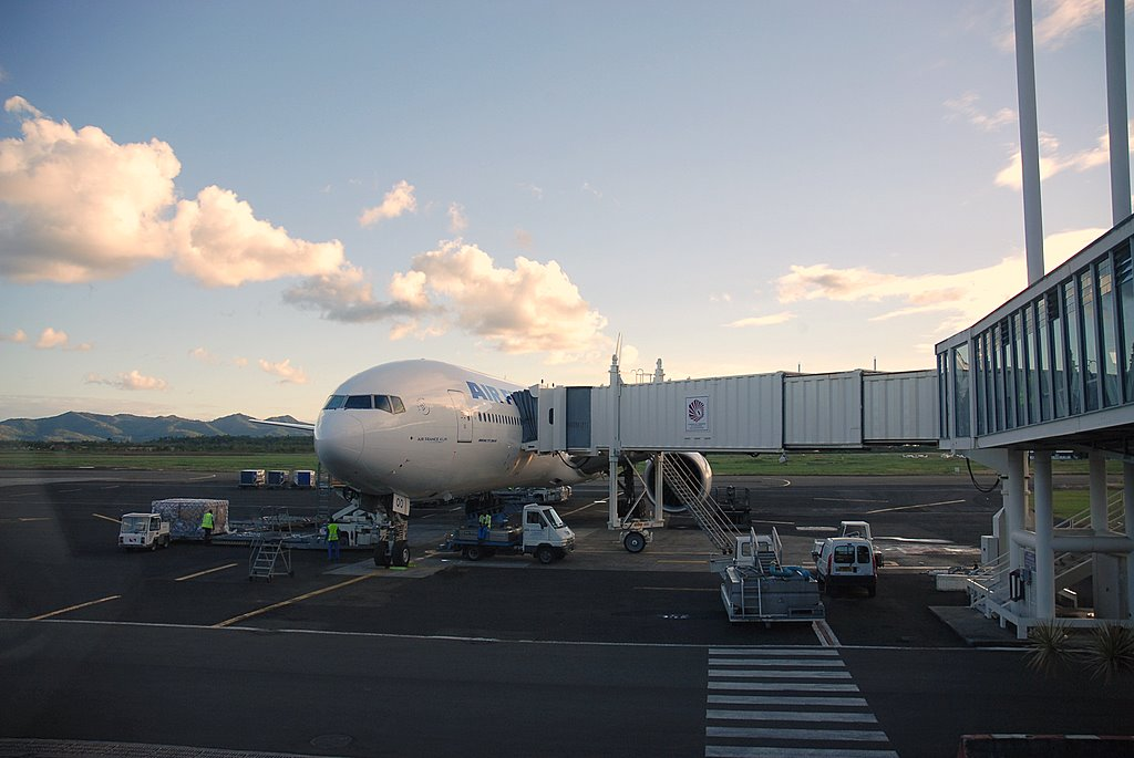 Boeing 777 sur le termac de l'aéroport Aimé Césaire